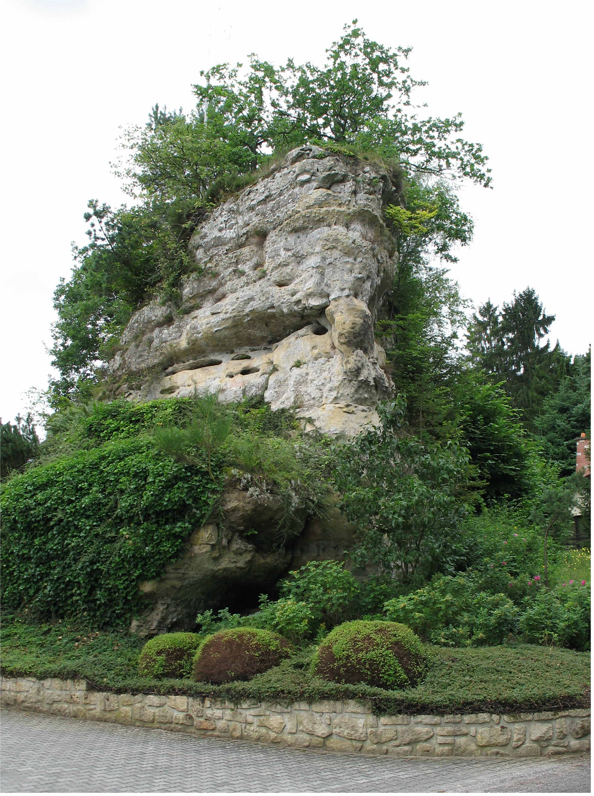 Fiels zu Stuppecht.